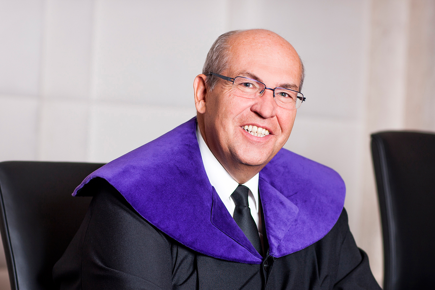 Dr. Helmut Hörtenhuber, Mitglied des österreichischen Verfassungsgerichtshofs seit 2008.